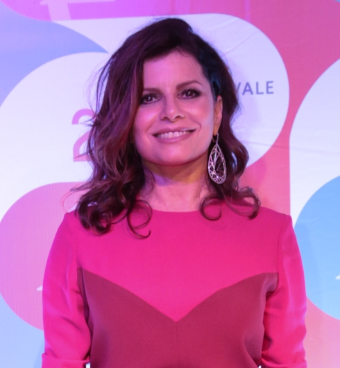 Débora Bloch durante o 25º Prêmio da Música Brasileira no Theatro Municipal. Foto: Reginaldo Teixeira (14/05/14)